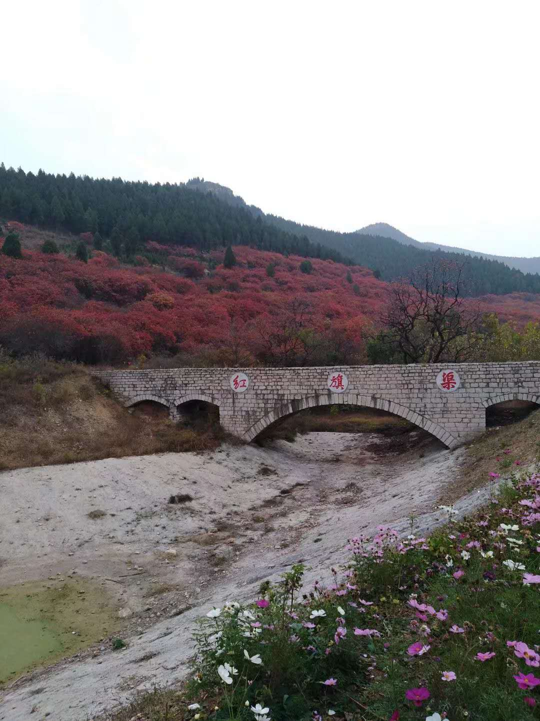 中文（中国大陆）: 临朐官护山红旗渠